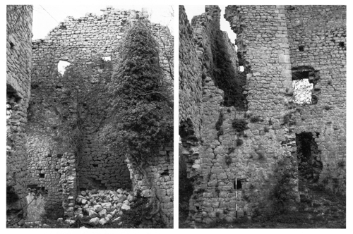 Alcuni scorci dei resti della torre